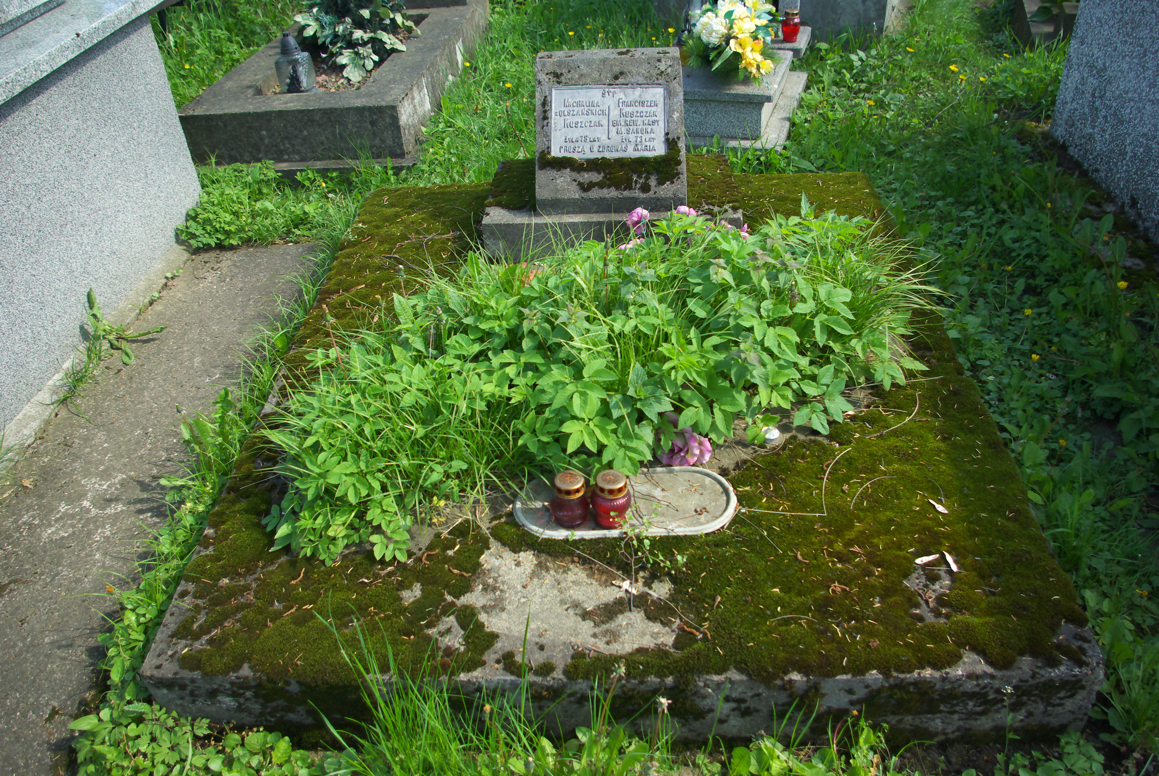 Grobowiec Franciszka i Michaliny Kuszczak w części "Matejki Stary" Cmentarza Centralnego w Sanoku.